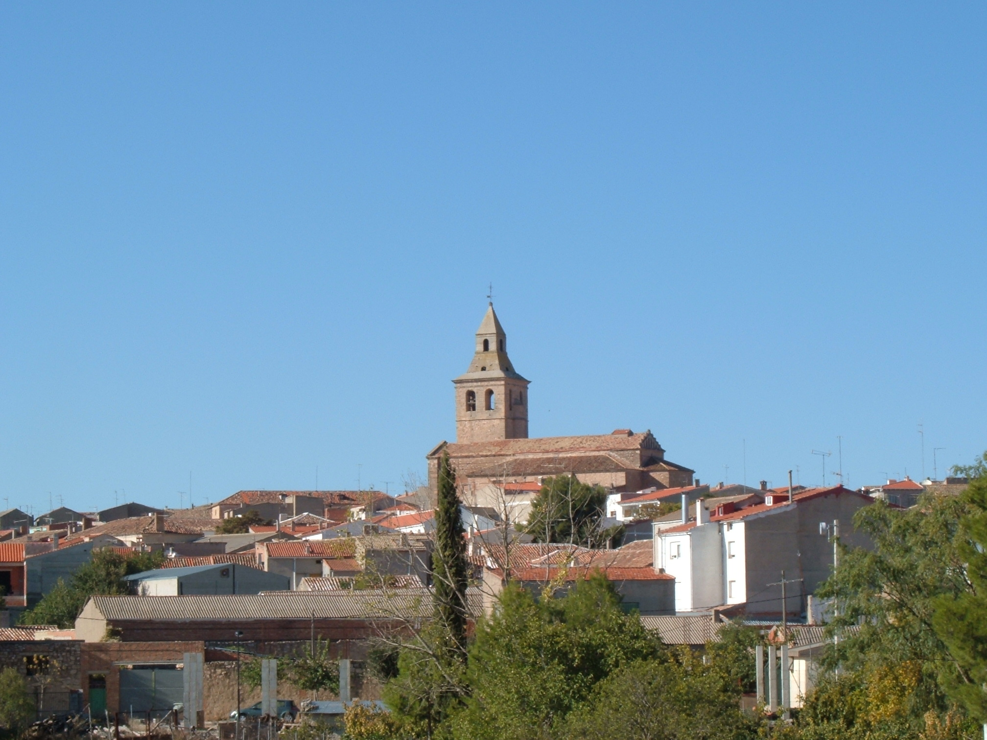 El Bonillo en otoño